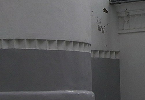 Беларуская (тарашкевіца): Сьвята-Раства-Багародзіцкая царква(крэпасьць абарончага тыпу). в. Мураванка This is a photo of Belarusian heritage monument. Reference number: 410Г000638 ( WLM)